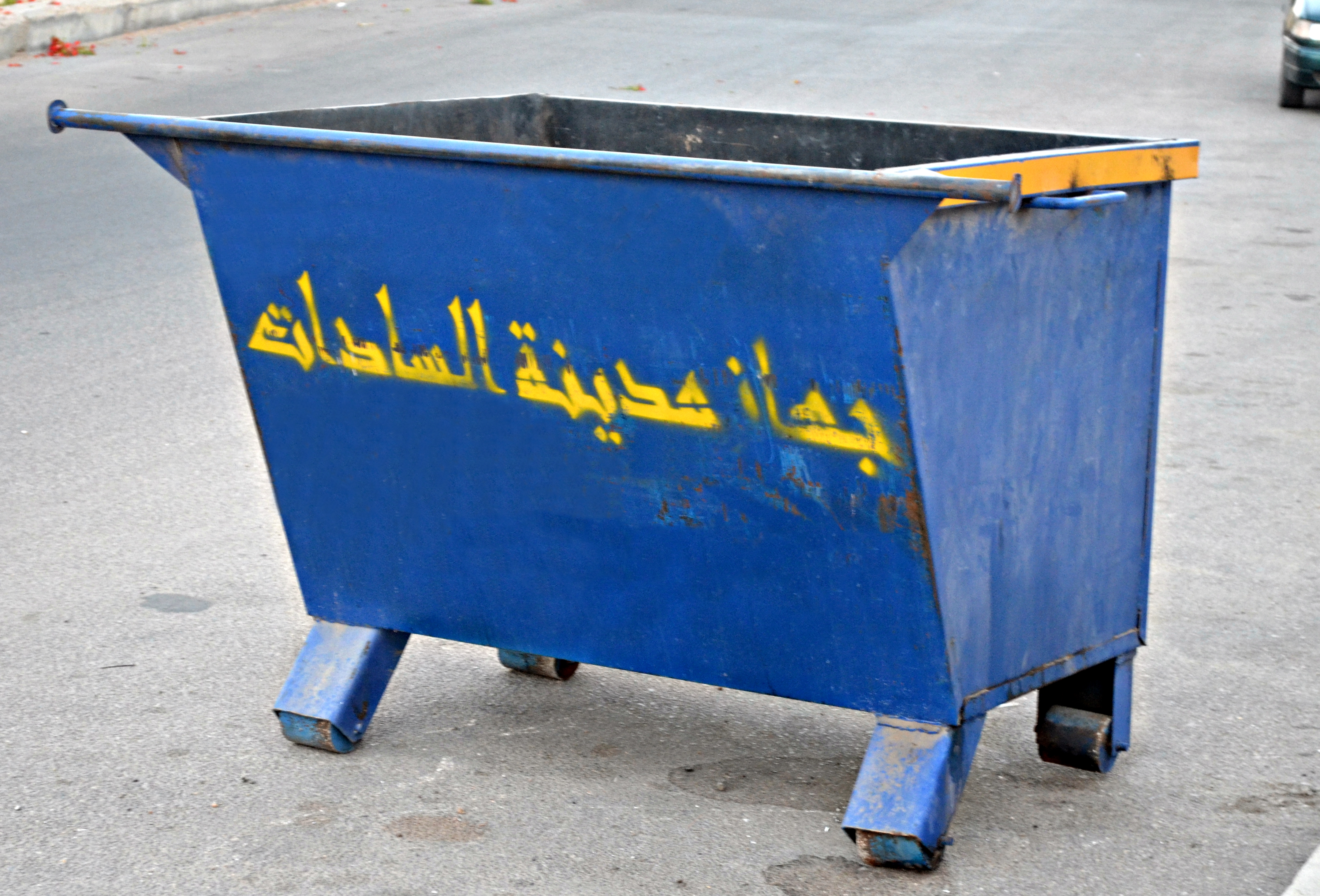 صندوق قمامة بالمنطقة السكنية الأولى، مدينة السادات